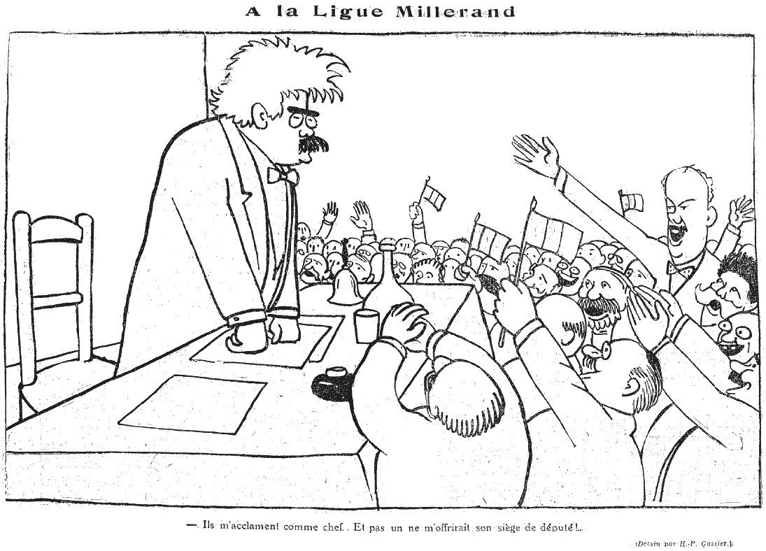 "A la ligue Millerand - Ils m'acclament comme chef. Et pas un ne m'offrirait son siège de député !"